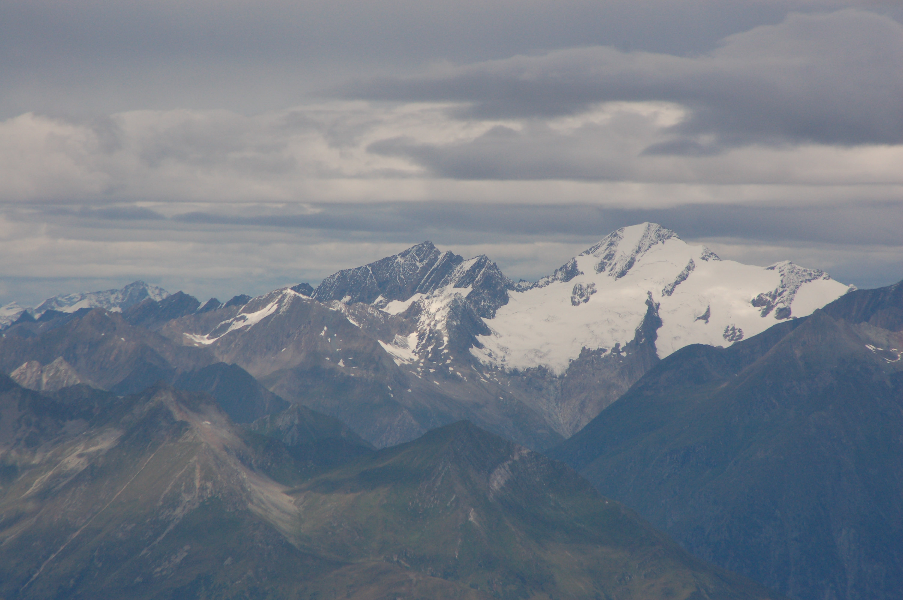 Röt- und Daberspitze mit dem Welitzkees gesehen vom Debantgrat (Schobergruppe). This file shows the National Park Hohe Tauern in Austria.